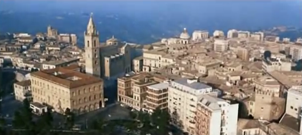 Una foto aerea del centro storico di Chieti, capoluogo dell'omonima provincia abruzzese